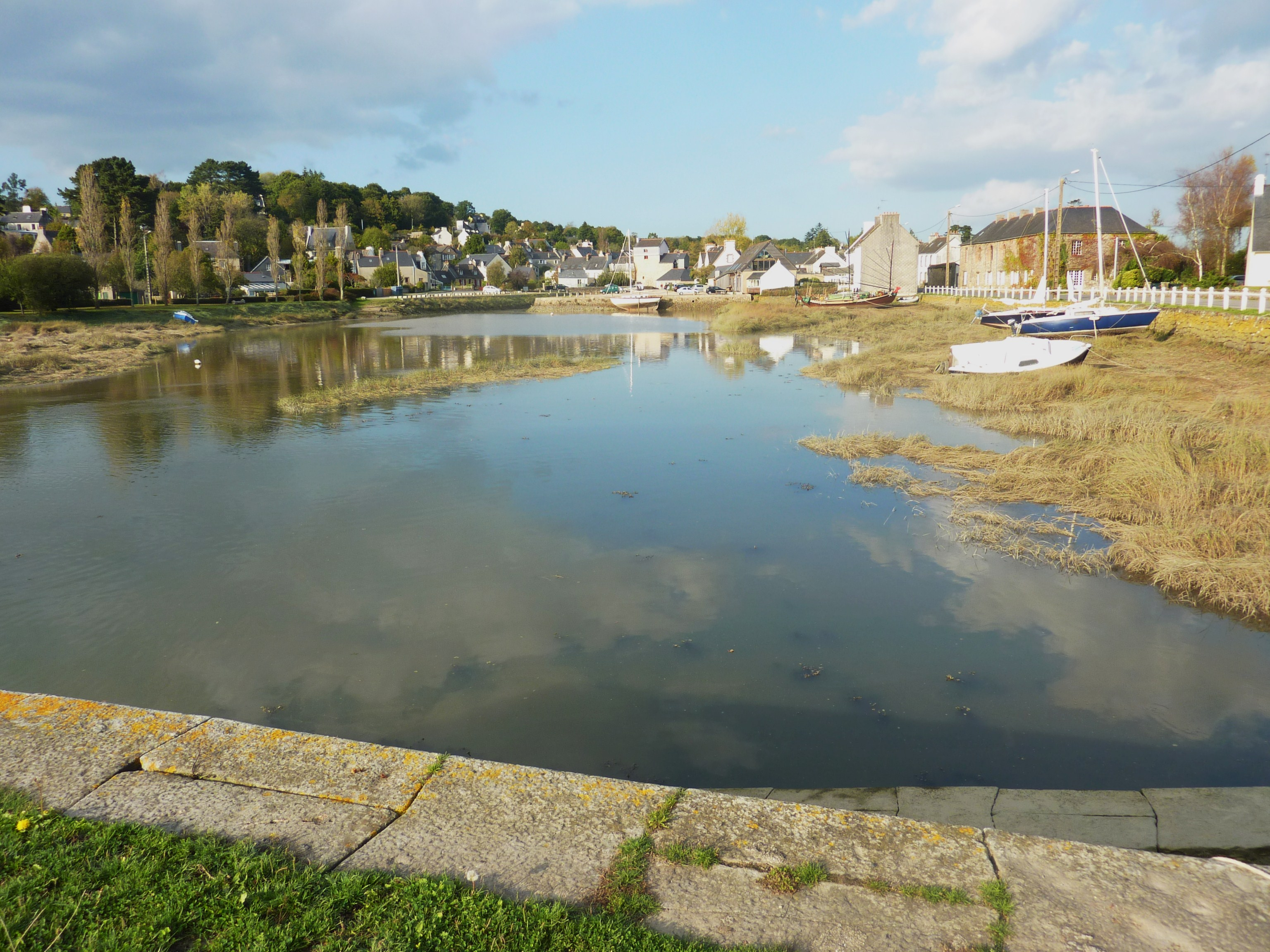 Daoulas et son port à mi-marée